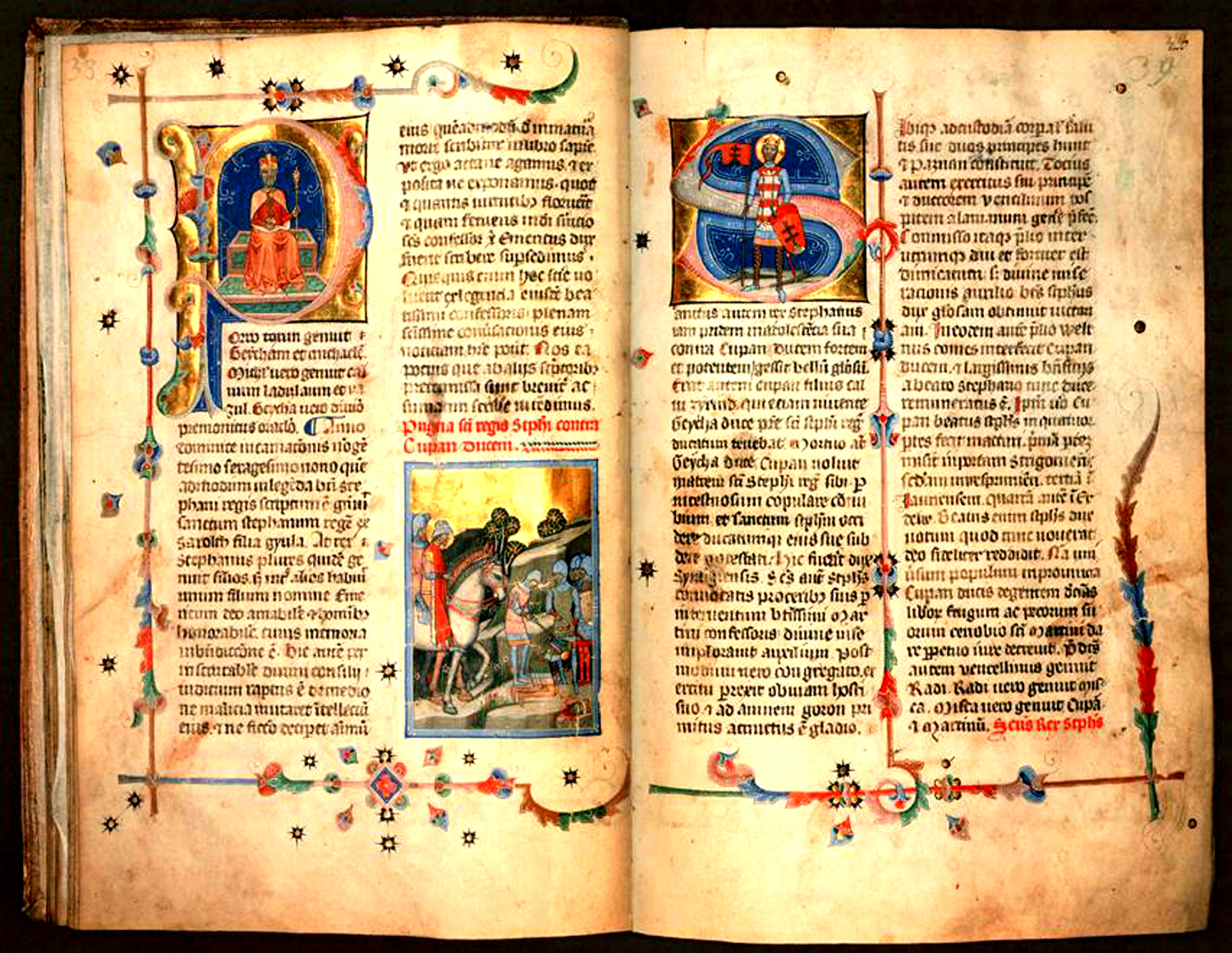 A Képes krónika (Chronicon pictum) egy latin nyelven írt krónika, illetve az azt tartalmazó kódex, amely 1360 körül készült Nagy Lajos budai udvarában, szerzője feltehetően Kálti Márk. Anjou királyainkat egy festő-család három generációja szolgálta. A nagyapa, Hertul, talán Nápolyból behívott olasz mester volt, s Károly Róbertnek dolgozott. Az apa, Miklós, I. Lajos király szolgálatában állott. Ő 1373-ban már halott, míg fia, Miklós, ugyanekkor még kiskorú, viszont 1385-ben már nem élt. Számosan a család második nemzedékébe tartozó Miklósban látják a Képes krónika festőjét, s felteszik, hogy az 1360-as évek elején kezdte el a festést, vagy esetleg, az írással szorosan együtt, azaz az 1350-es évek végén.